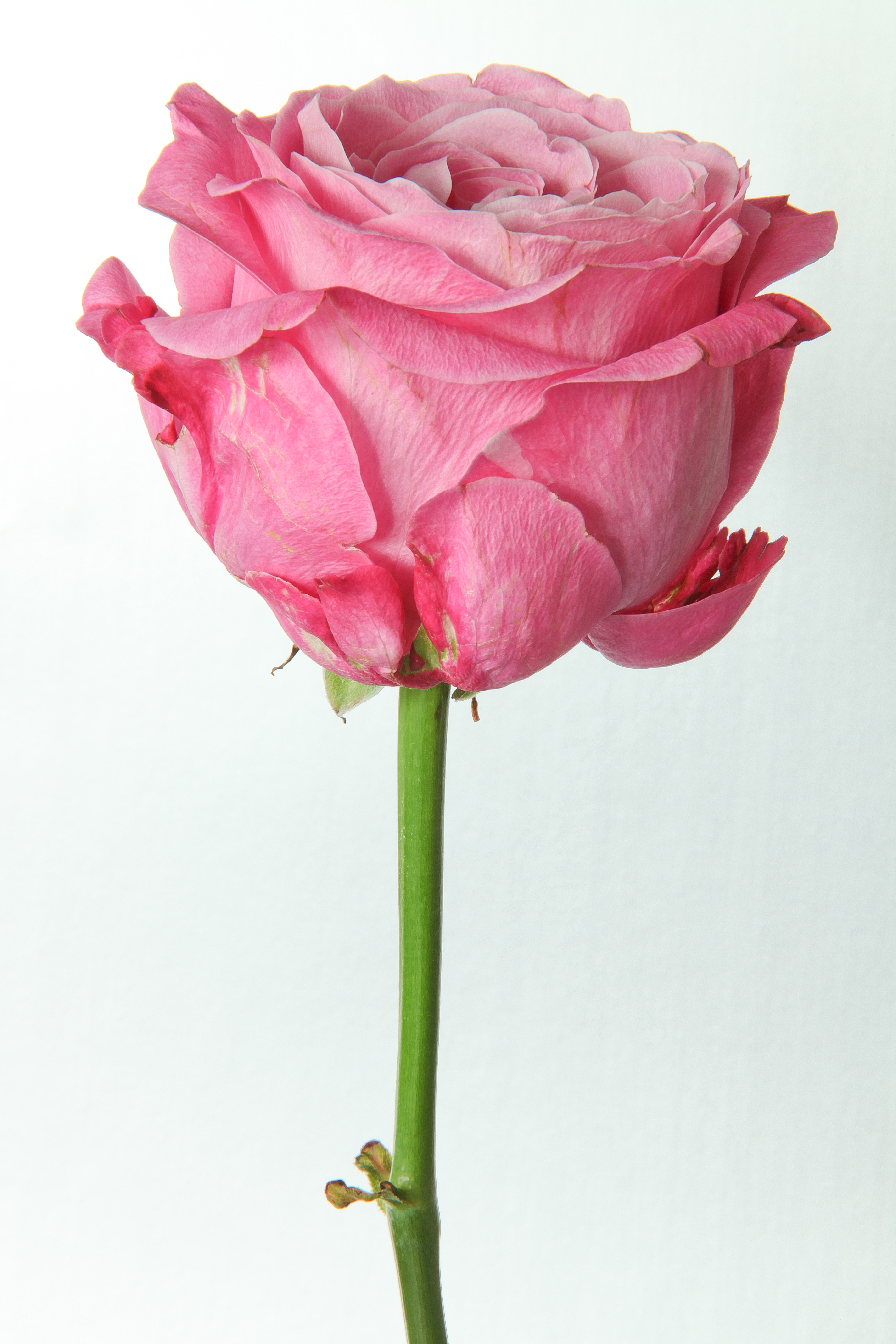 Pink rose